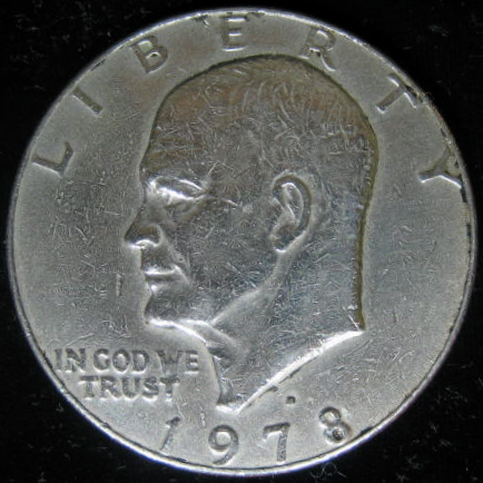 Eisenhower Dollar - 1978 - dritto - Disegnatore:Frank Gasparro - Diametro mm.38,1 Zecche di Denver - San Francisco. Collezione privata - fotografia personale